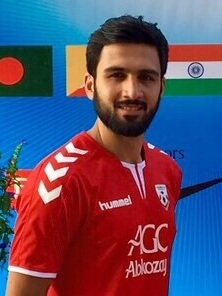 Kani Taher zum Auftakt des SAFF Suzuki Cup 2015, der offiziellen Südasienmeisterschaft